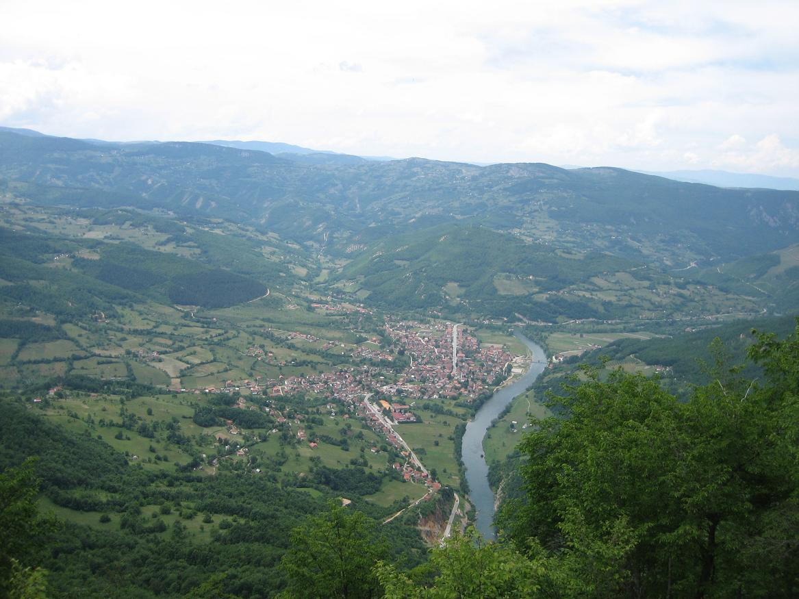 Pogled na Brodarevo